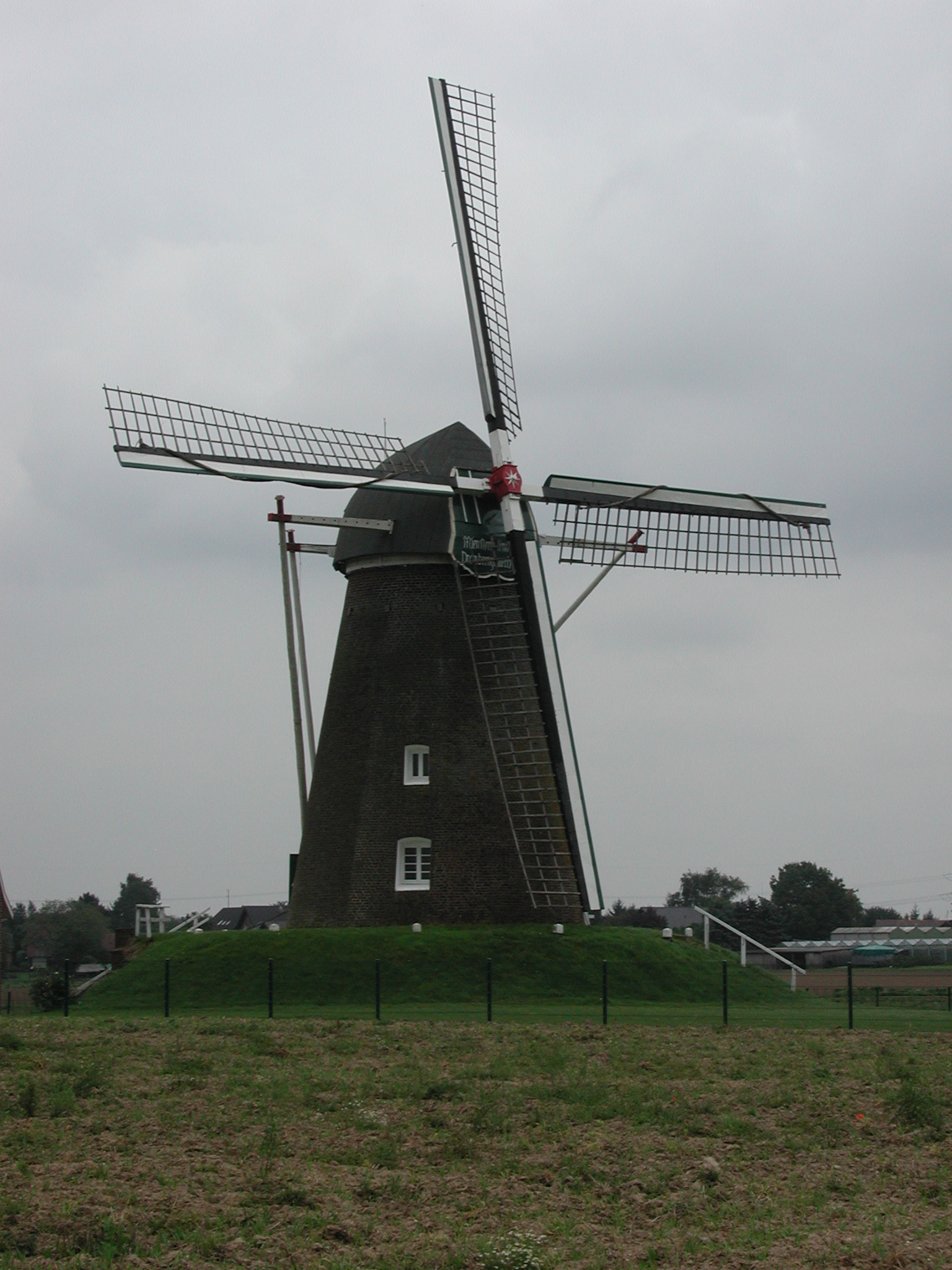 Waldfeucht Bergholländer Haaren. Aufgenommen mit Olympus C3040